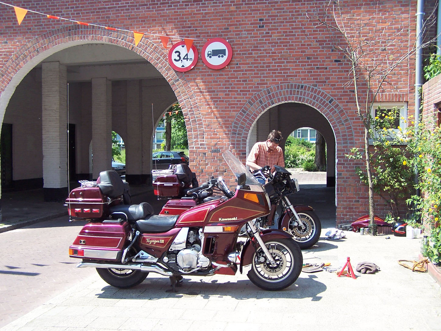 2 '86 modellen waarvan gewerkt wordt aan de achterste